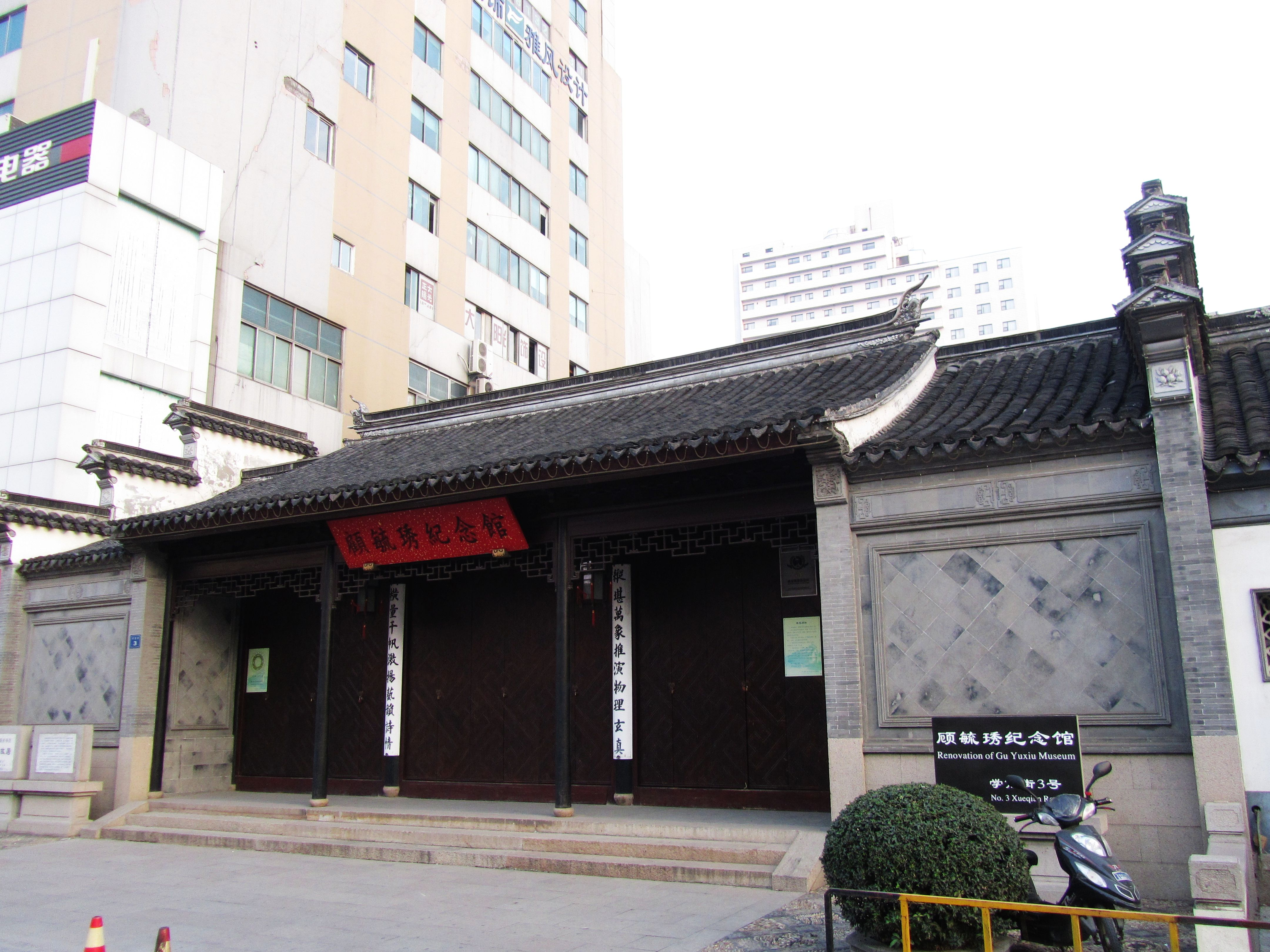 无锡崇安区学前街3号，顾毓秀故居大门。